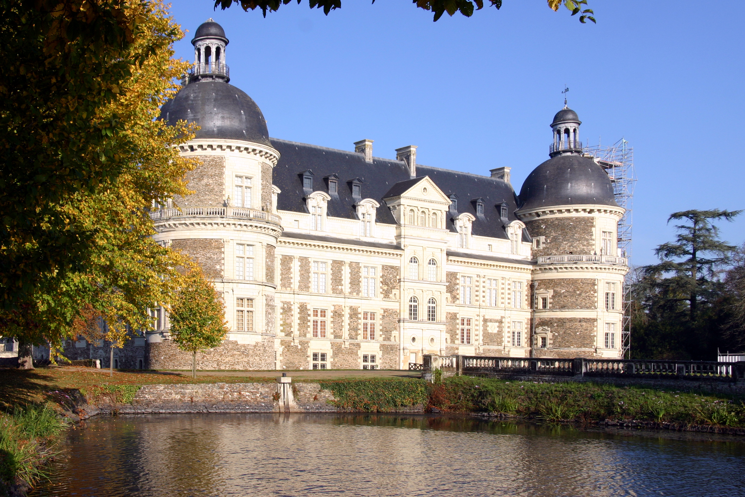 Schloss Serrant